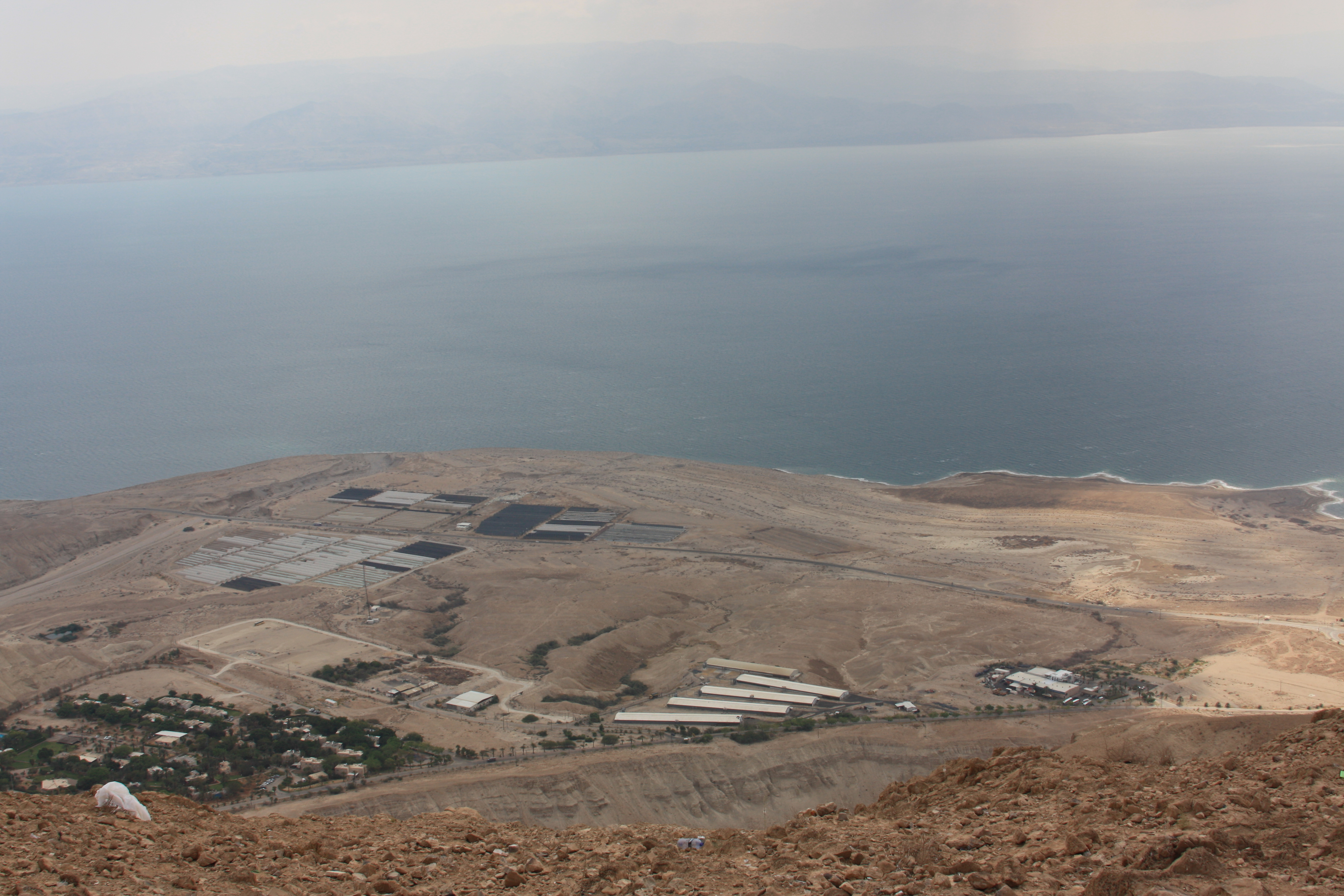 מפעלי AHAVA